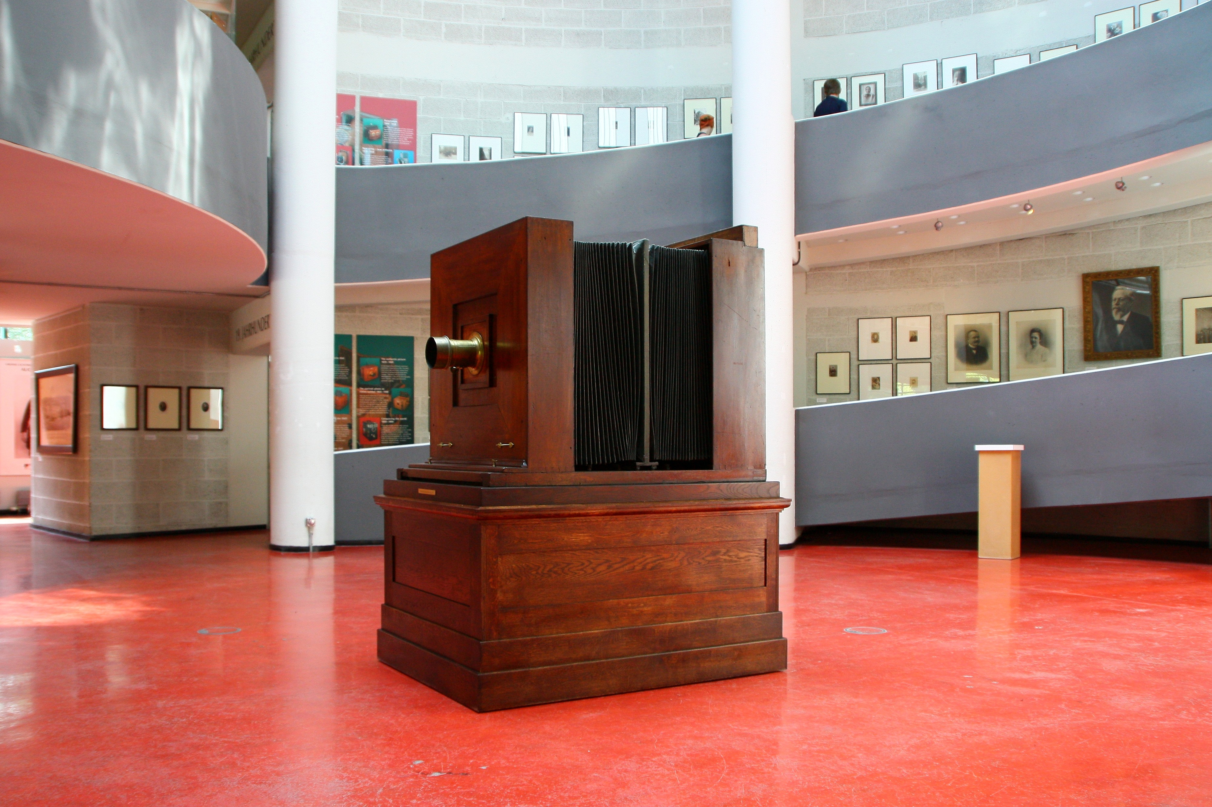 Deutsches Fotomuseum - hölzerne 2,50 Meter große Reprokamera des Leipziger Kameraherstellers Hoh & Hahne vom Ende des 19. Jahrhunderts